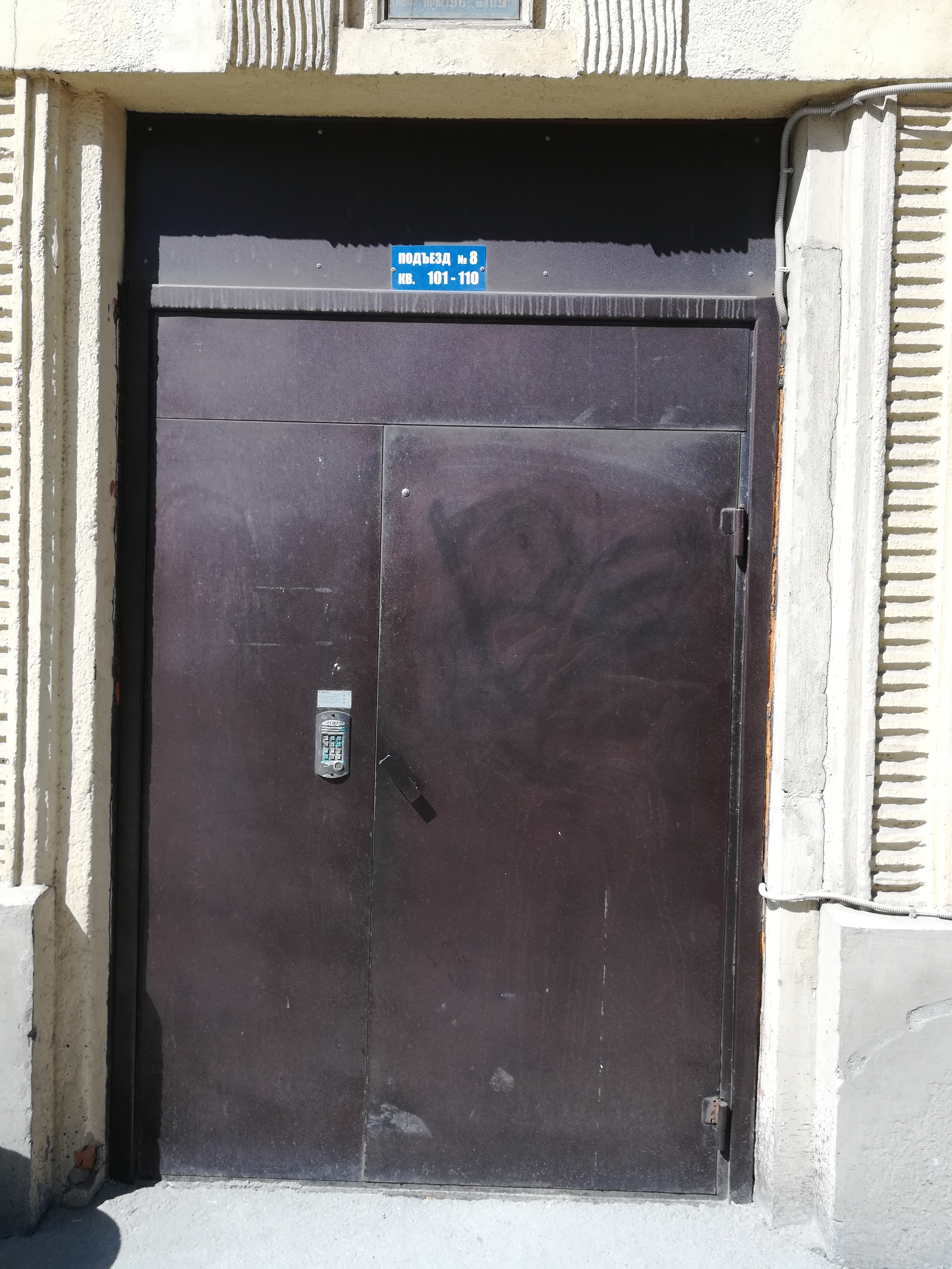 Новосибирск